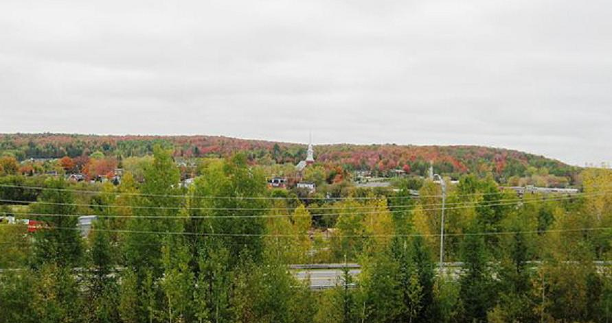 Vue sur Richmond